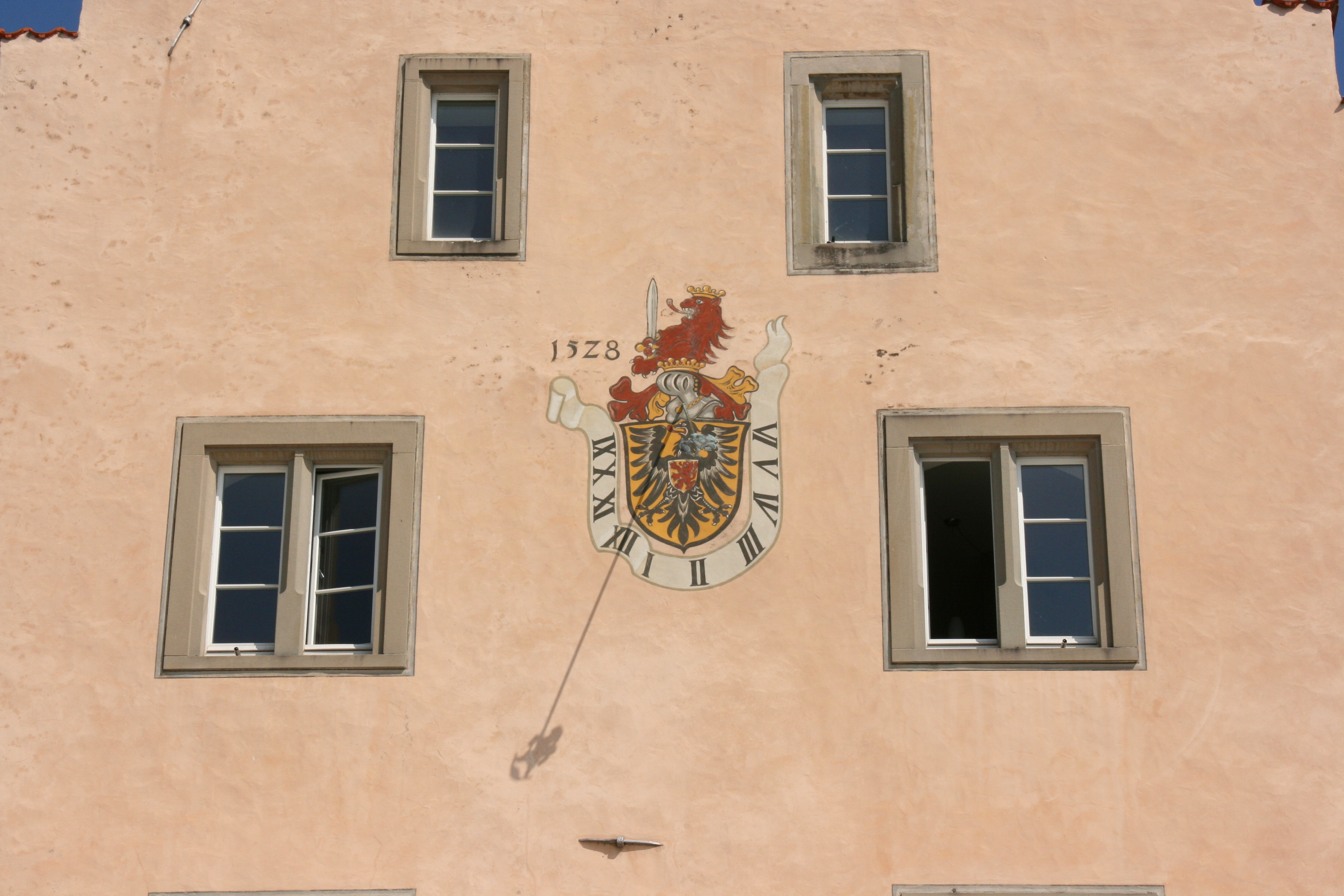 Zeughaus (Zeughausgasse 2) an der Seepromenade in Überlingen